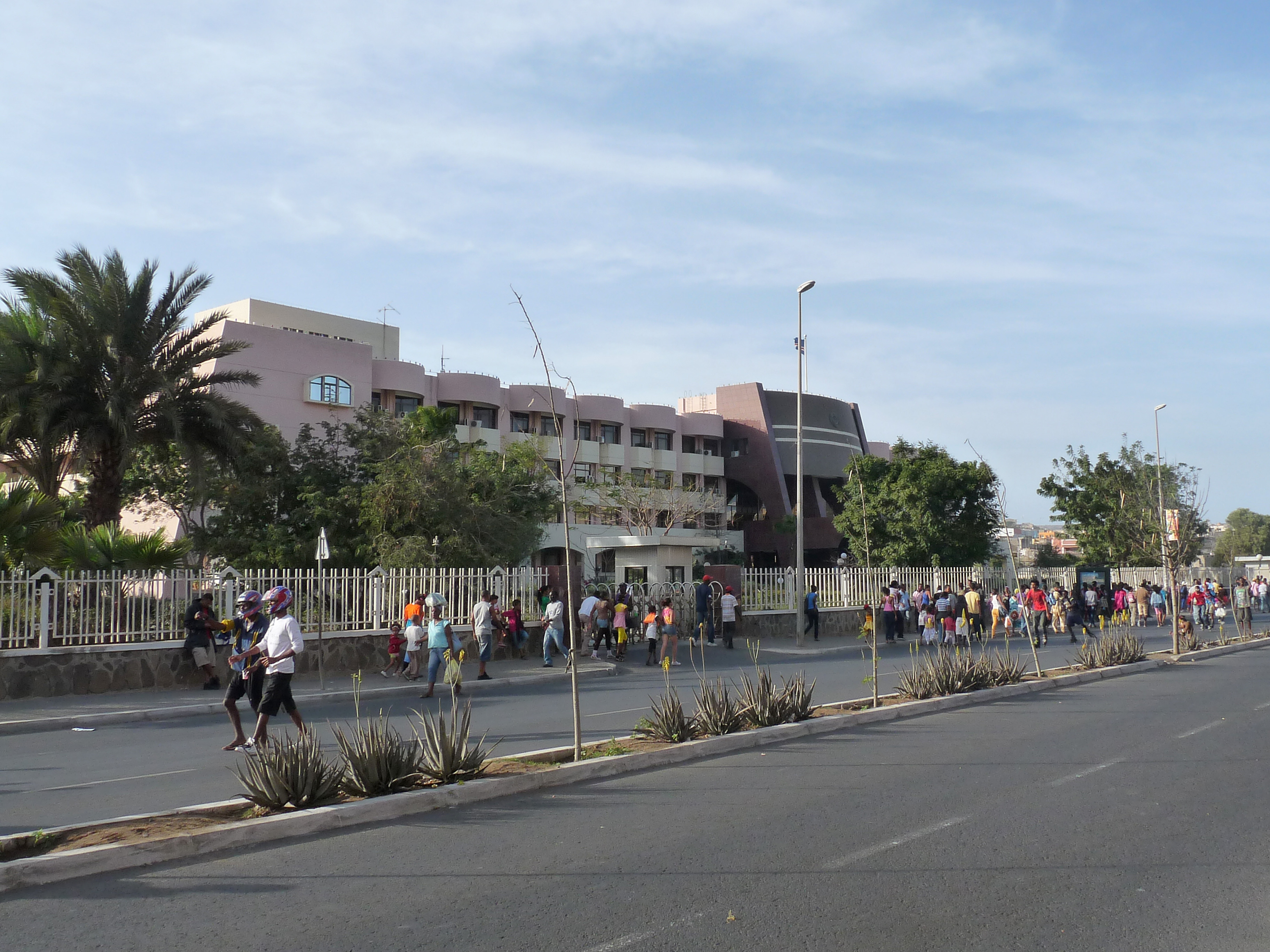 Praia : Assemblée nationale du Cap-Vert (le jour de Carnaval)